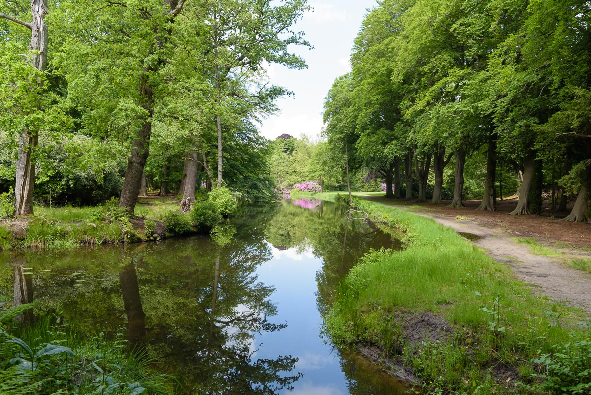 Landgoed Bantam, de vijver met middenachter de open plek waar het huis stond. Hilversum/Wijdemeren, Noord Holland, Nederland.